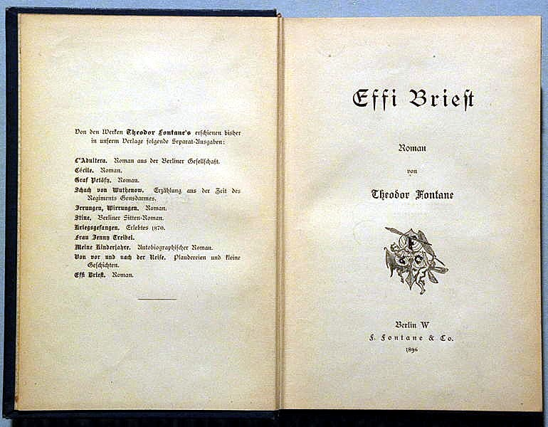 Theodor Fontane: Effi Briest. Erste Buchausgabe 1896